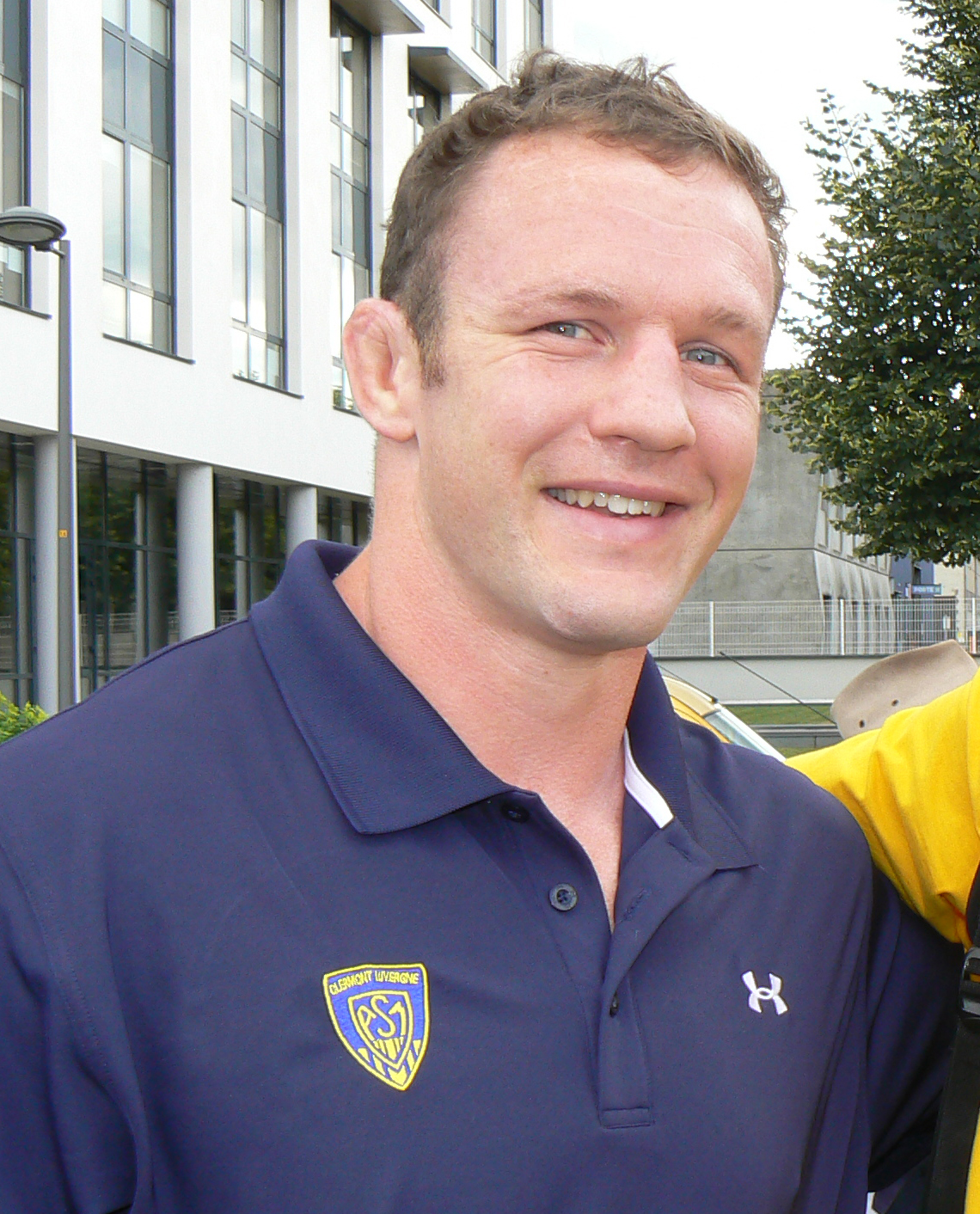 Le rugbyman international écossais Jason White.